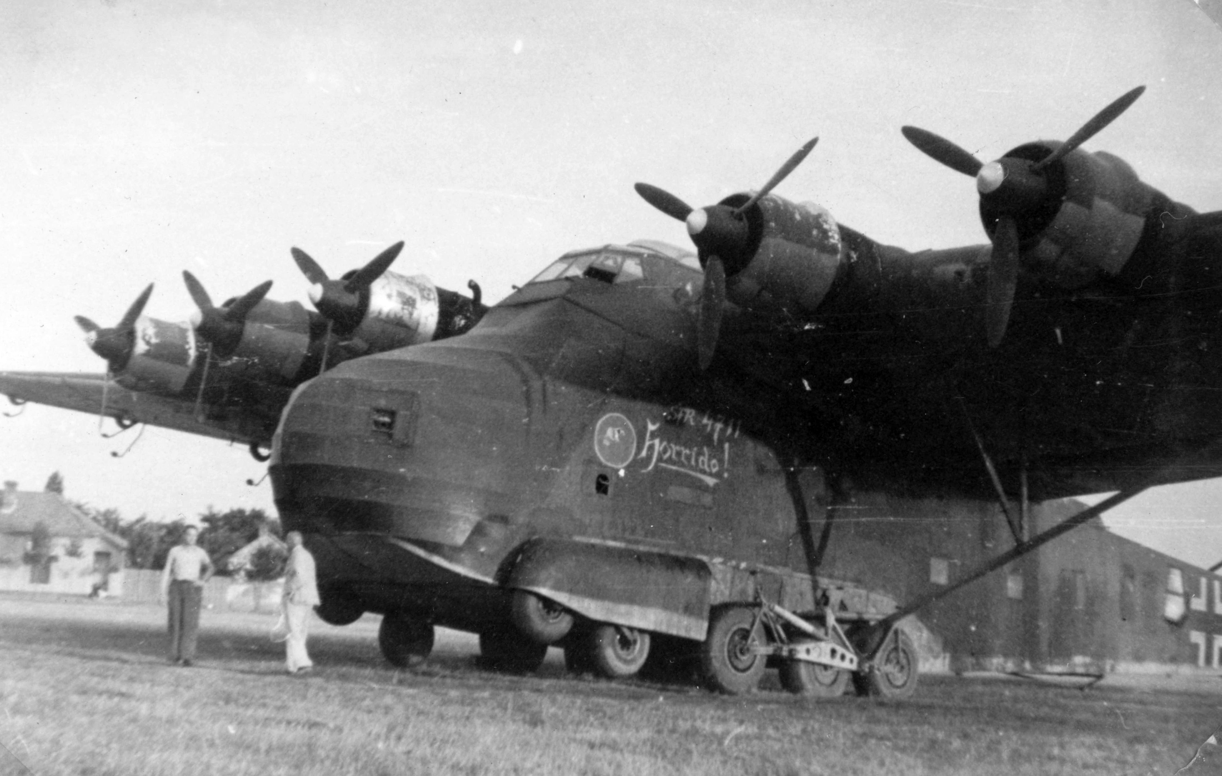 repülőtér, a német Transportgeschwader 5 (TG 5) alakulat Me-323 Gigant szállítógépe. Location: Hungary, Szentes Tags: airplane, Messerschmitt-brand, Gerrman brand Title: repülőtér, a német Transportgeschwader 5 (TG 5) alakulat Me-323 Gigant szállítógépe.